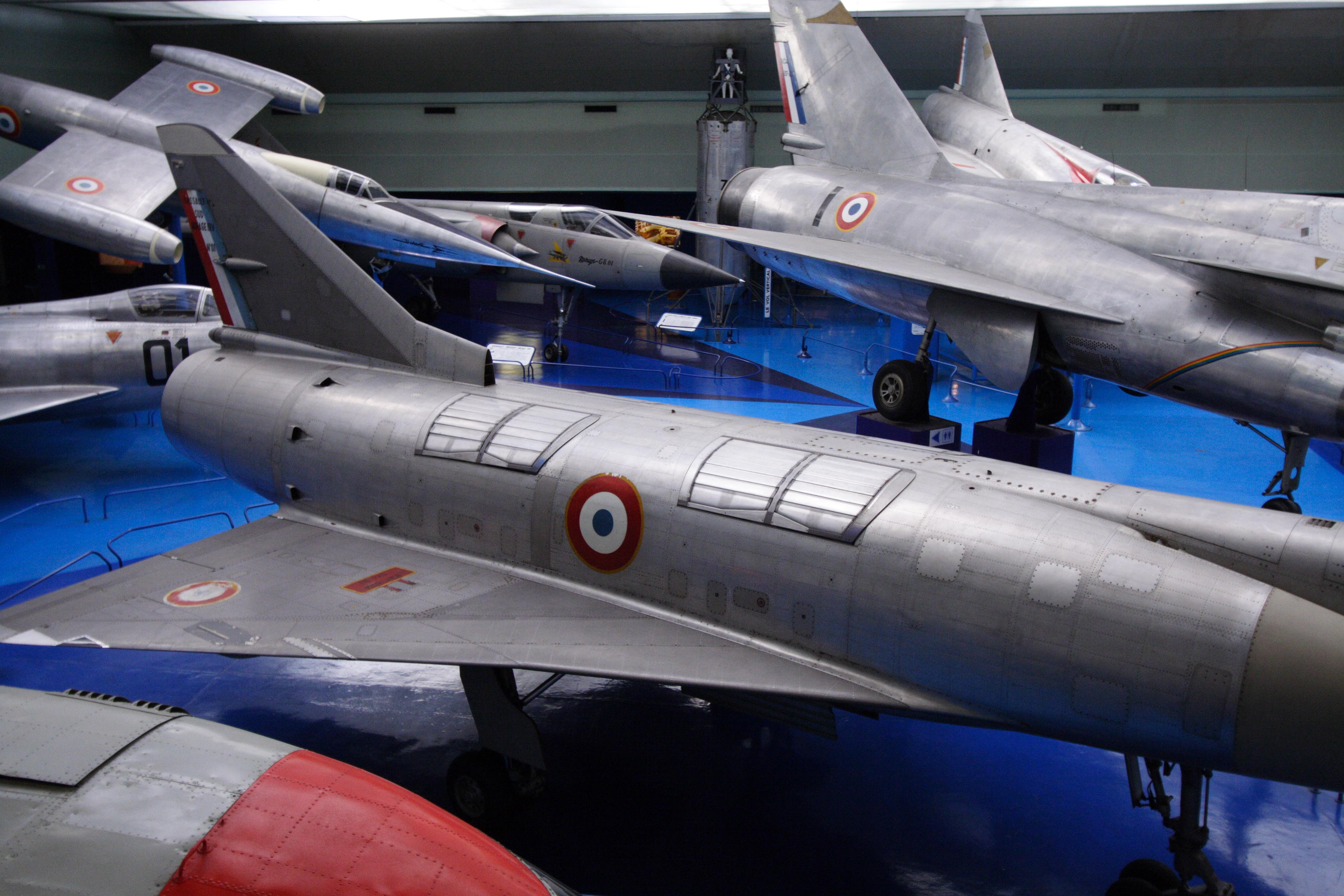 French experimental aircraft Mirage III.V (Musée de l'air et de l'espace, Le Bourget, France)